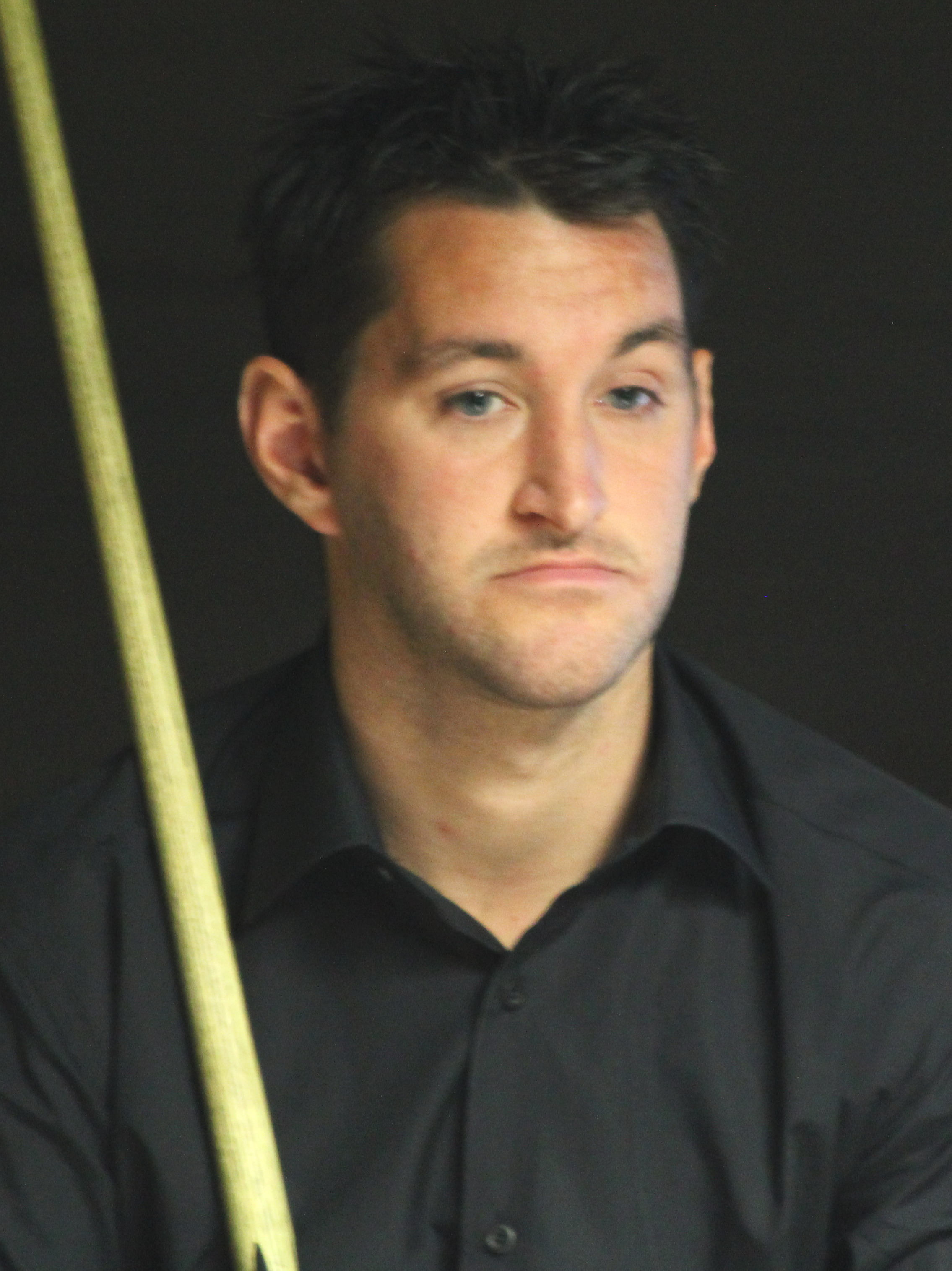 Tom Ford beim Paul Hunter Classic 2014